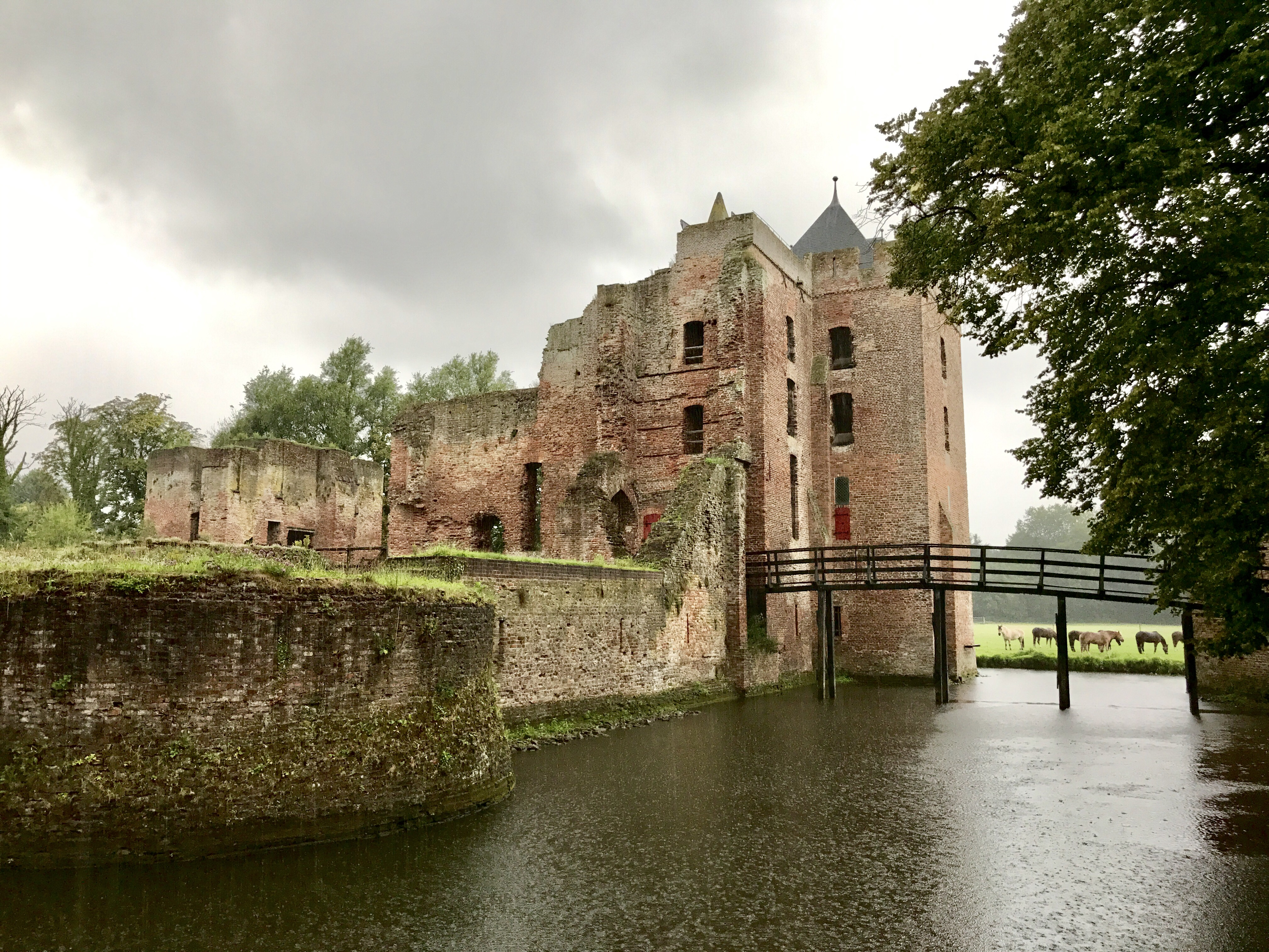 De Ruïne van Brederode te Santpoort tijdens een regenbui